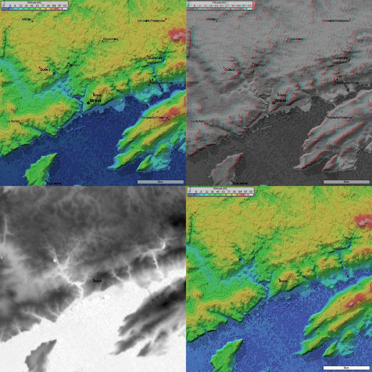 4 images topographique (20 km de coté) de Brest prises par la mission SRTM. Image topographique + position des villes image topographique en relief + position des villes image topographique en niveau de gris (utile pour displacement map dans les logiciel 3D) Image topographique sans les villes Générée par le logiciel Radiomobile à partir des données domaine public de la mission SRTM de la NASA.